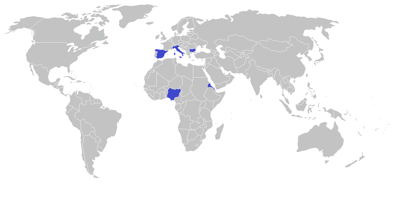 Участнички на Олимпиадата по италиански език